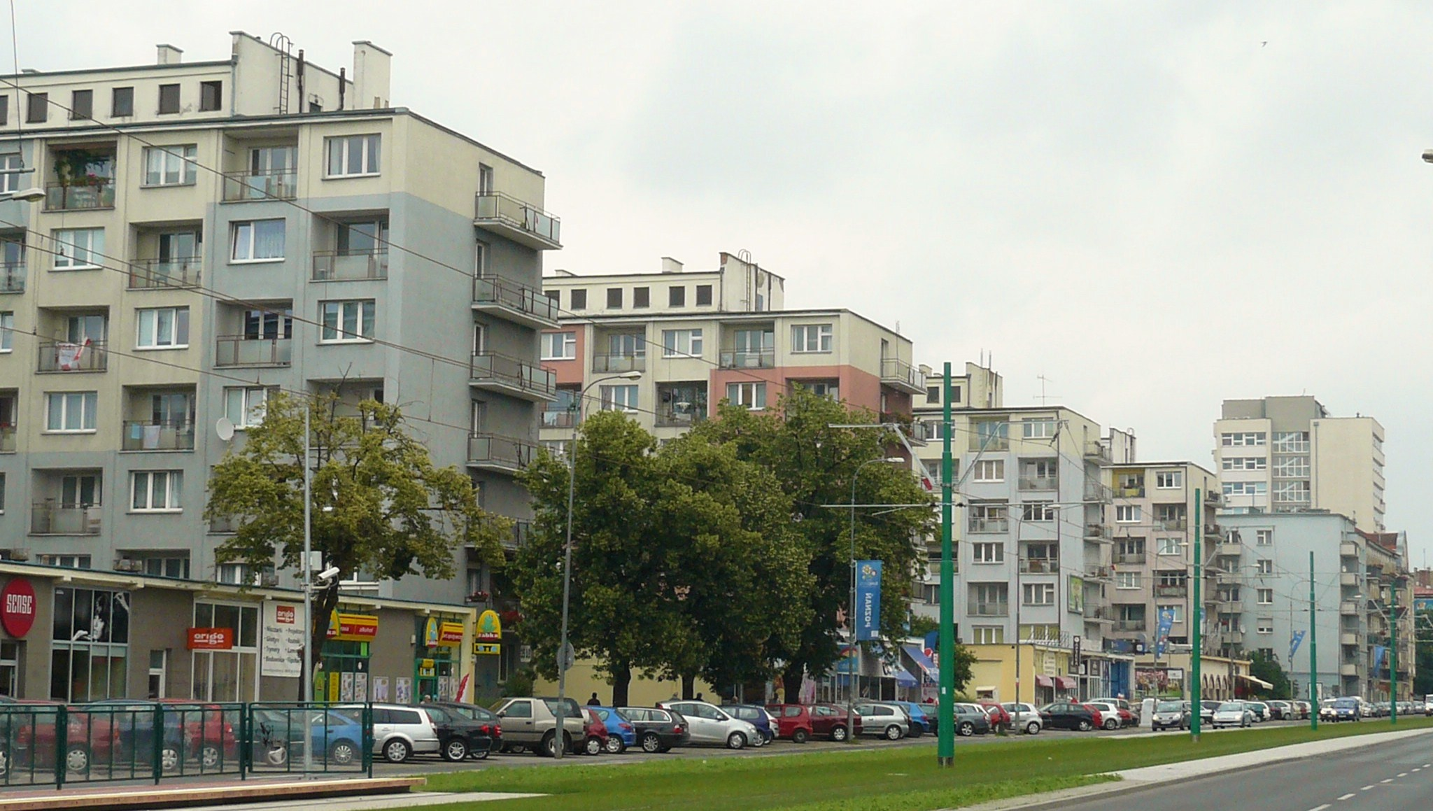 Poznań, ul. Grunwaldzka 29-35, zespół modernistycznej zabudowy.